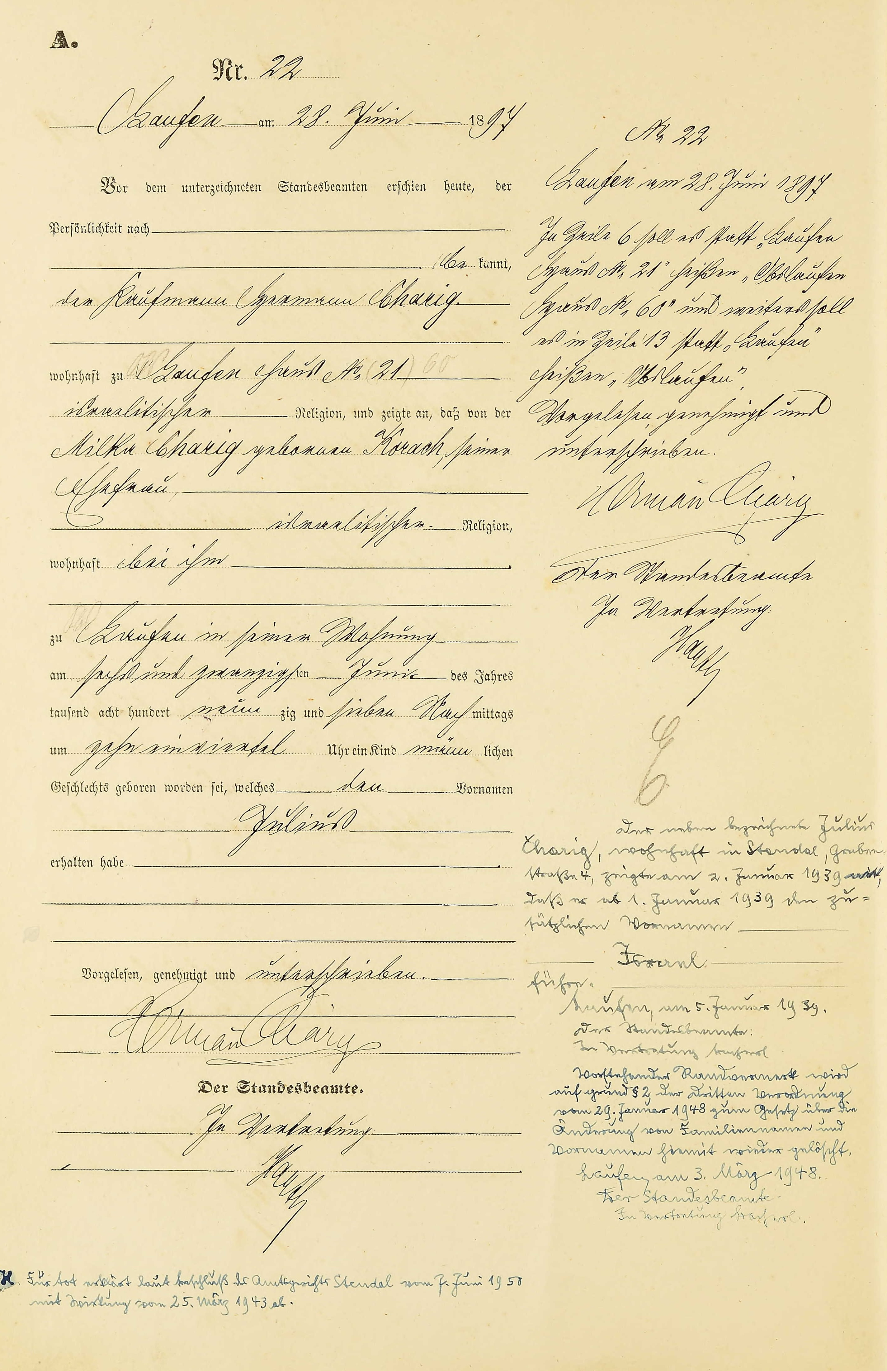 Geburtseintrag Charig im Standesamtsbuch Laufen